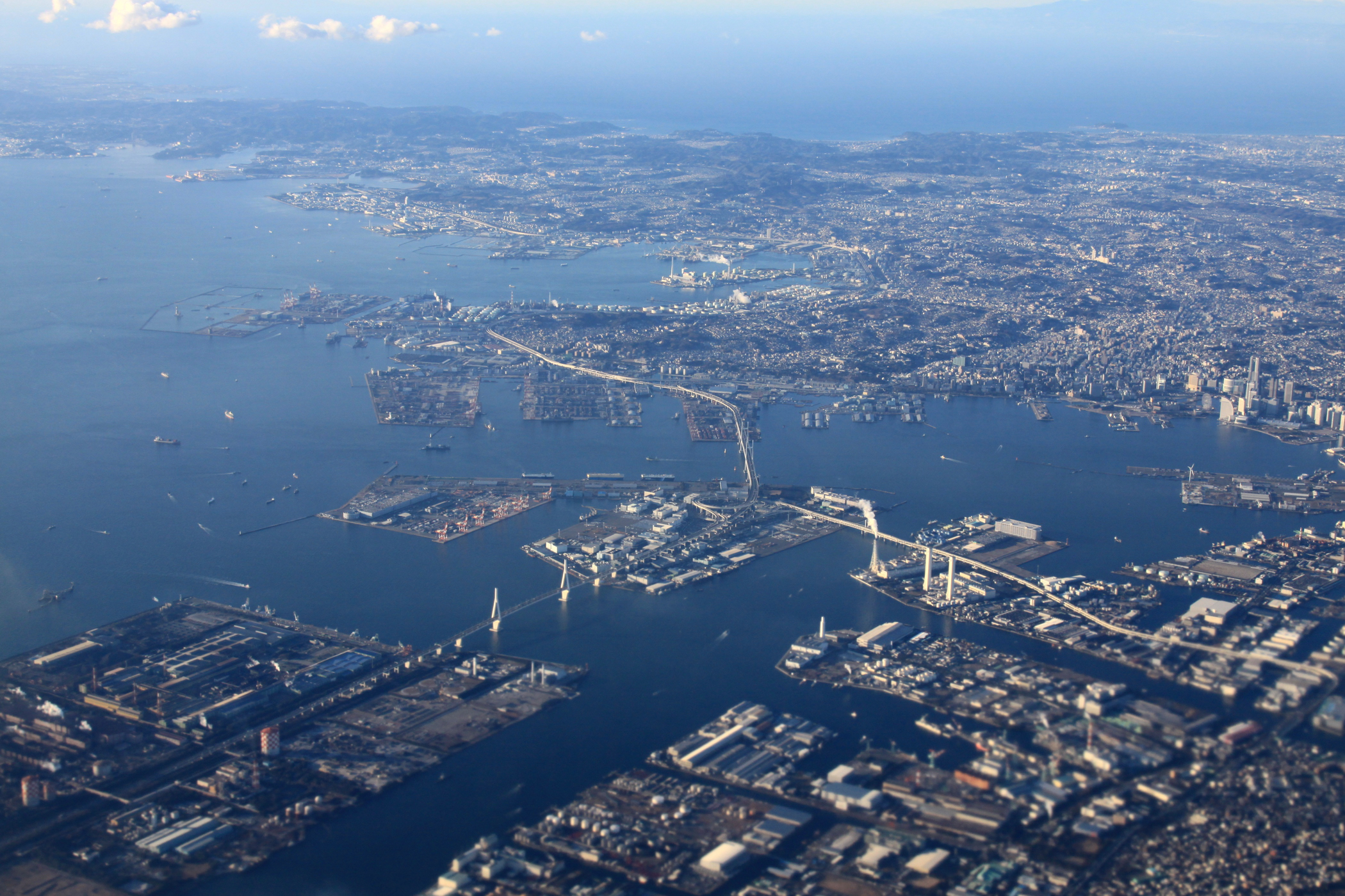 Yokohama, Japan